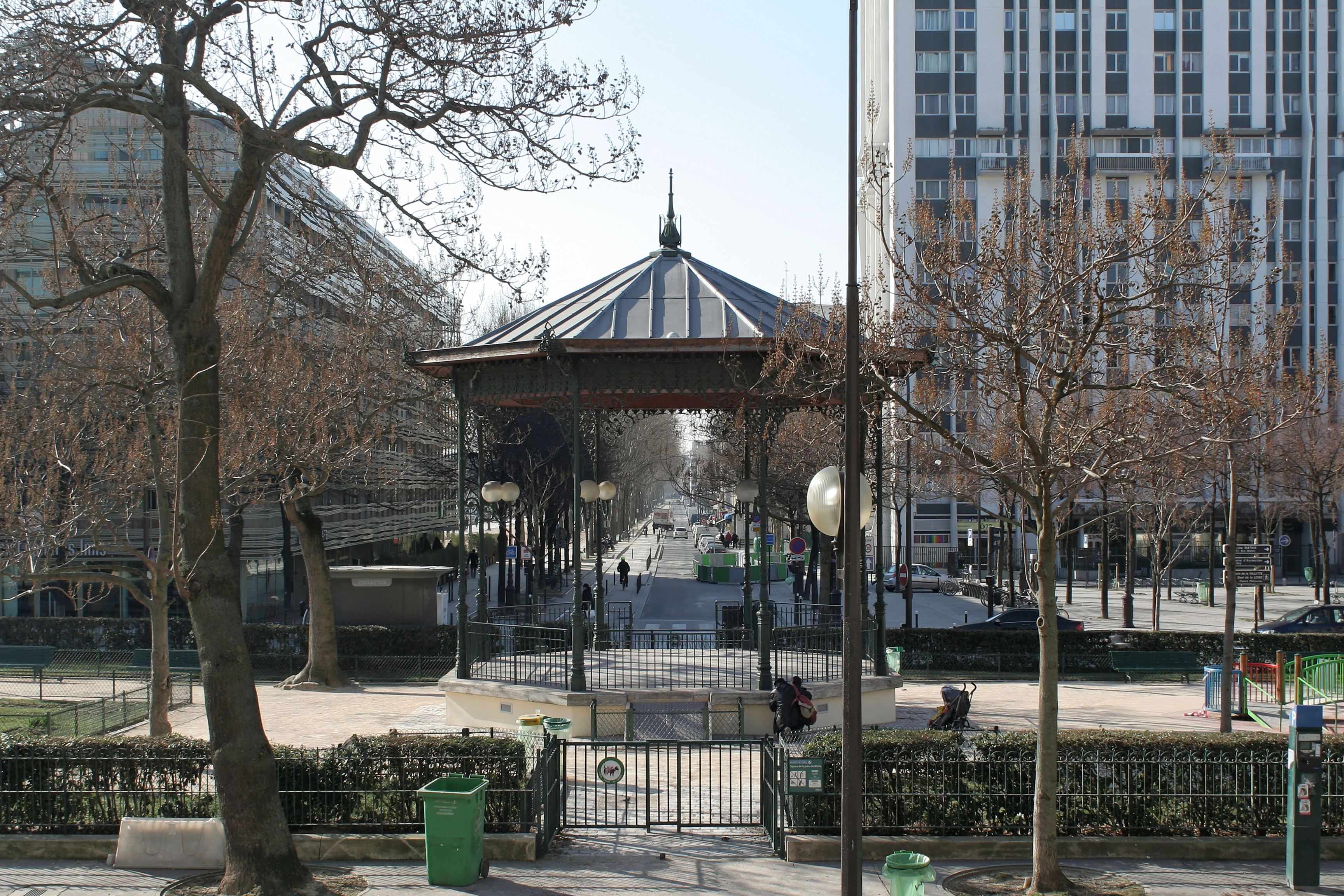 Square de la place de Bitche depuis le porche de l'église Saint-Jacques-et-Saint-Christophe de la Villette.